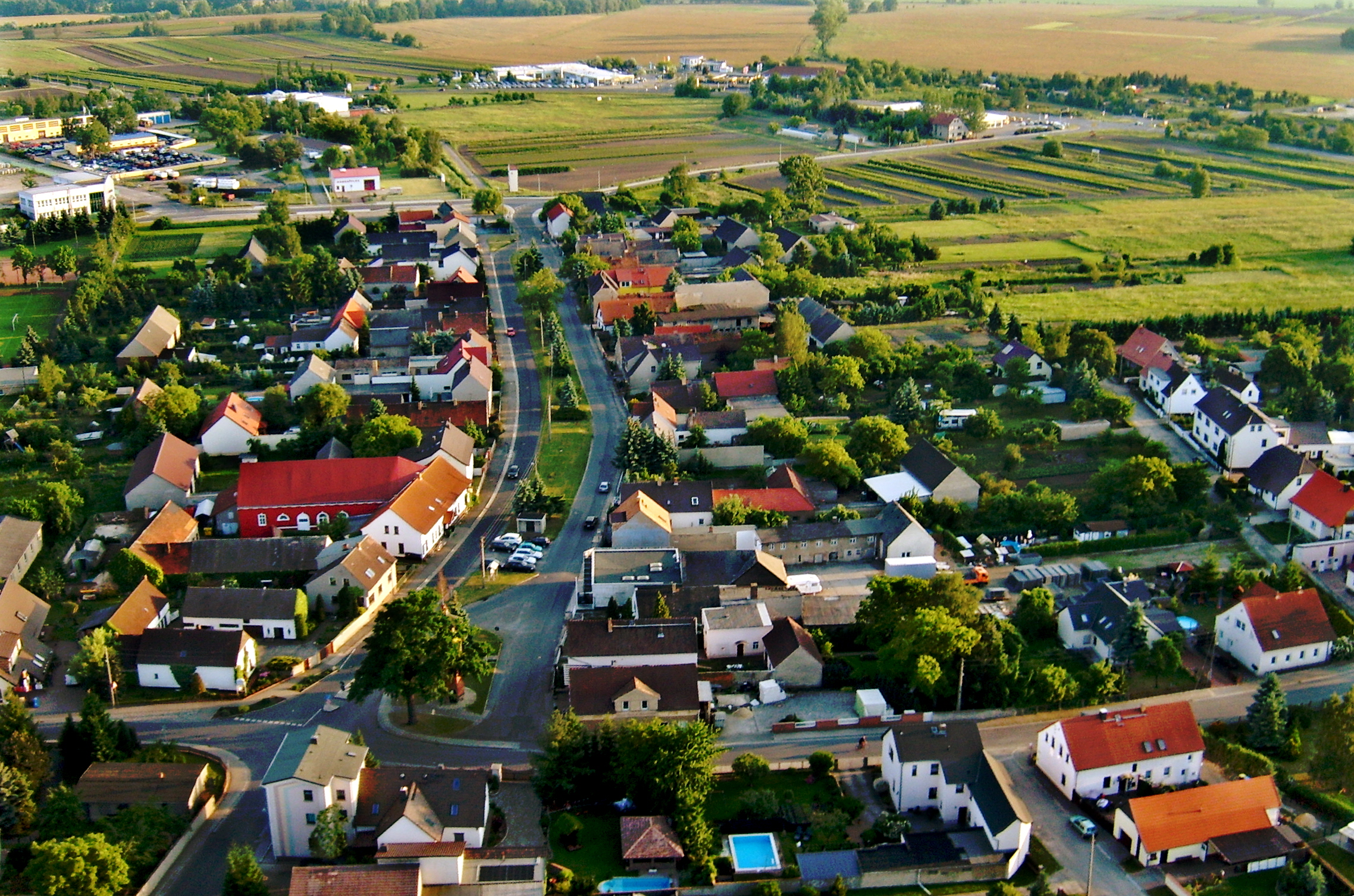 Die Breite Straße in Biehla aus der Luft.